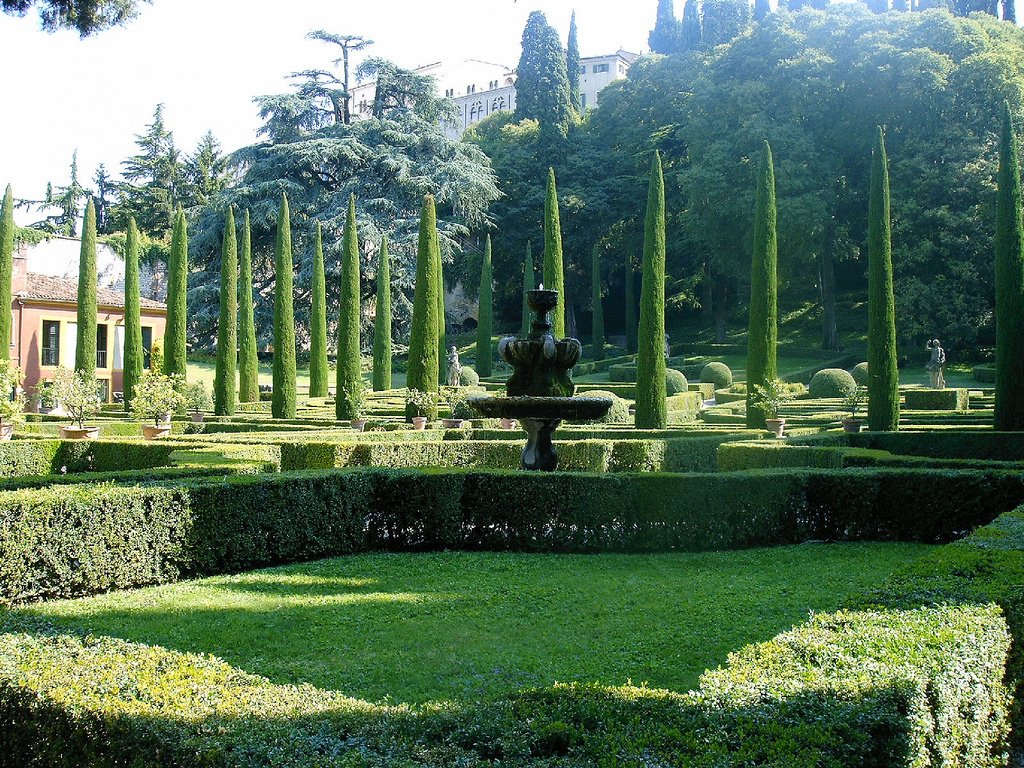 Verona, Veneto, Italia